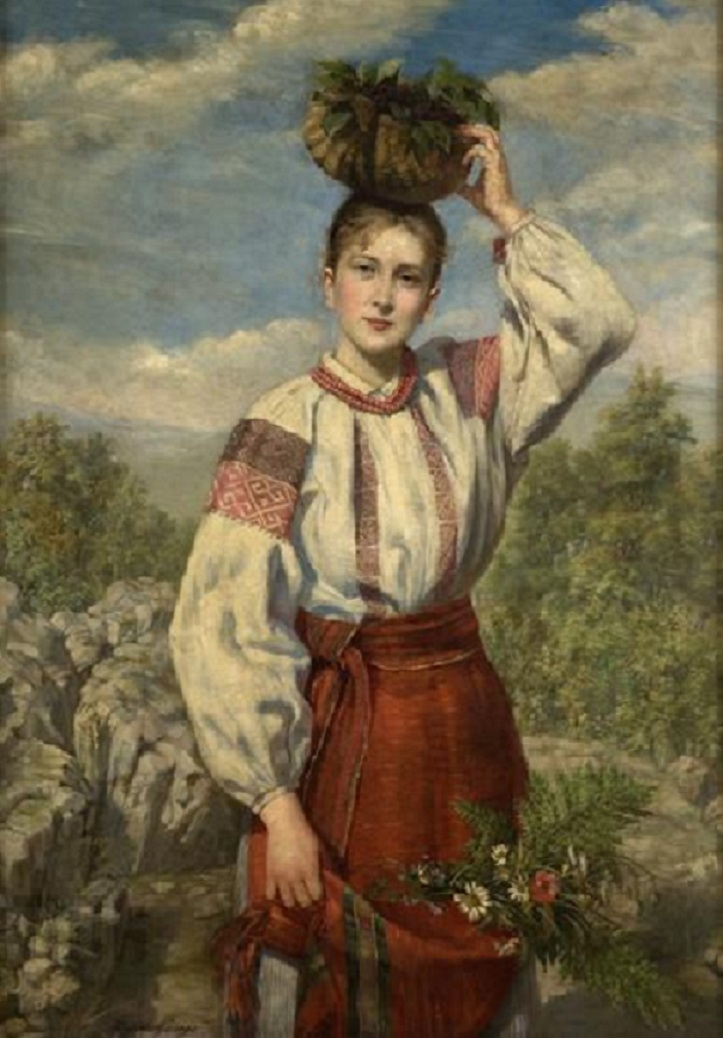 " З лісу ": Подільський стрій .Краківський музей в " Суконих Рядах " ( Sukiennice )